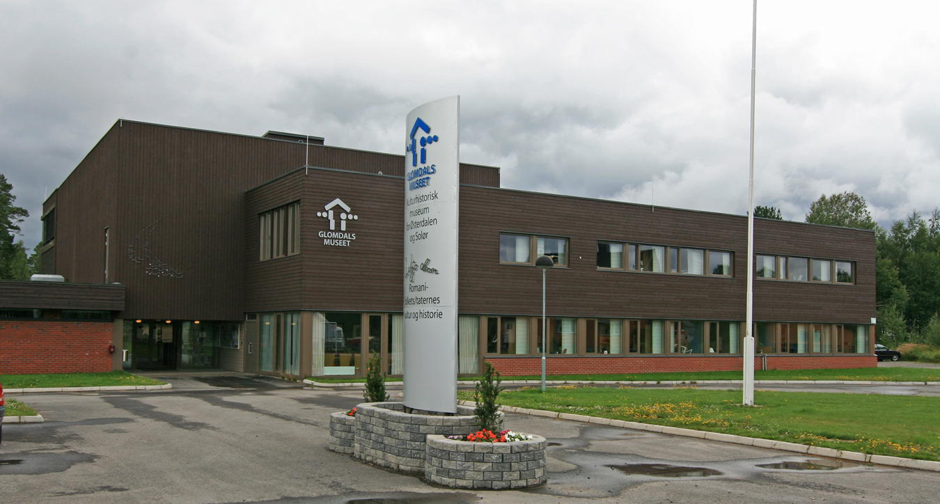 Glomdalsmuseet, Elverum, Norway.